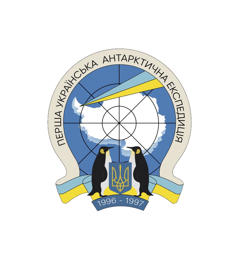 Перша Українська антарктична експедиція — перша наукова експедиція на українську антарктичну станцію Академік Вернадський у період з січня 1996 по травень 1997 року. "Dmytro Sergienko Digital Museum of ukrainian history"